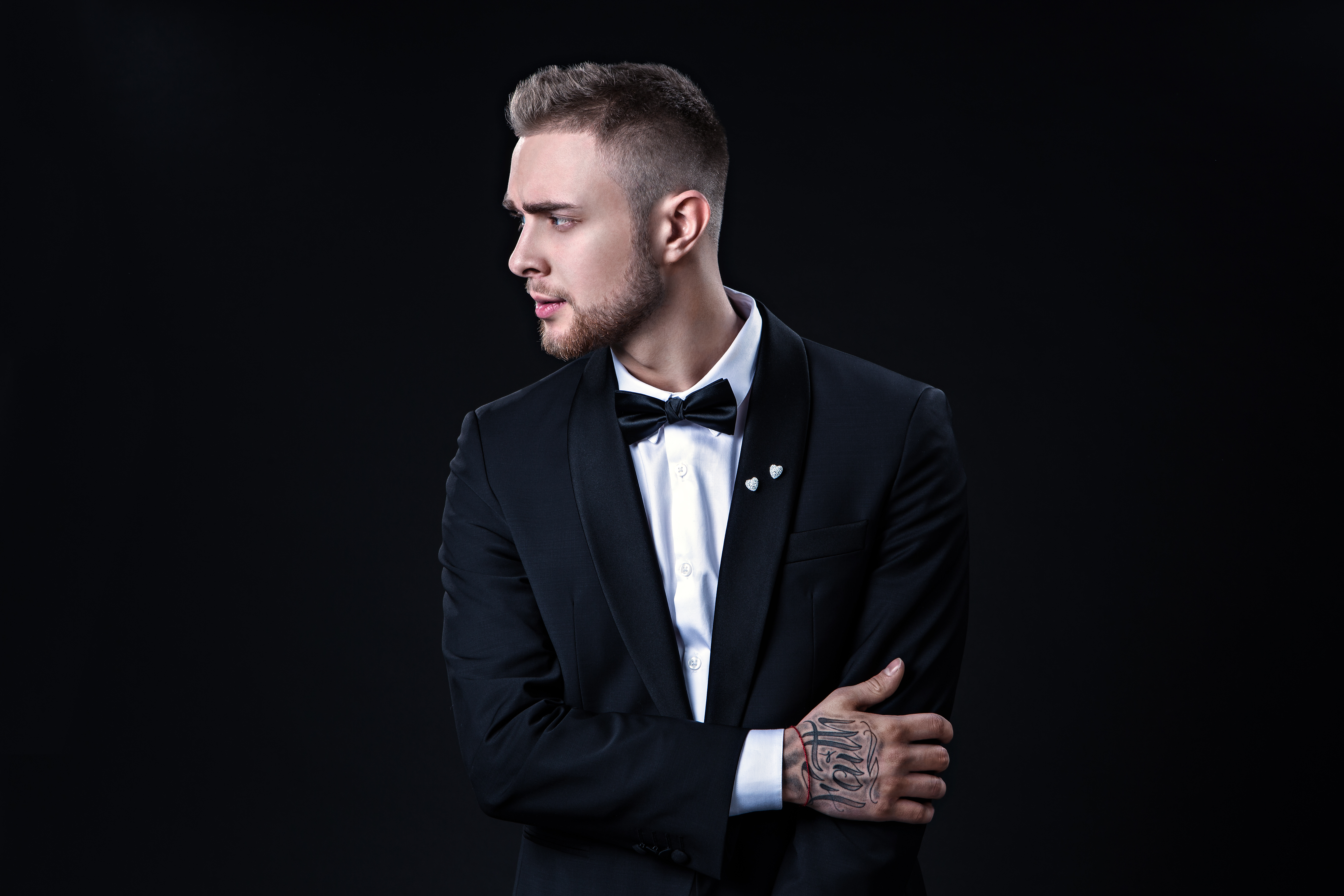 Єгор Крід